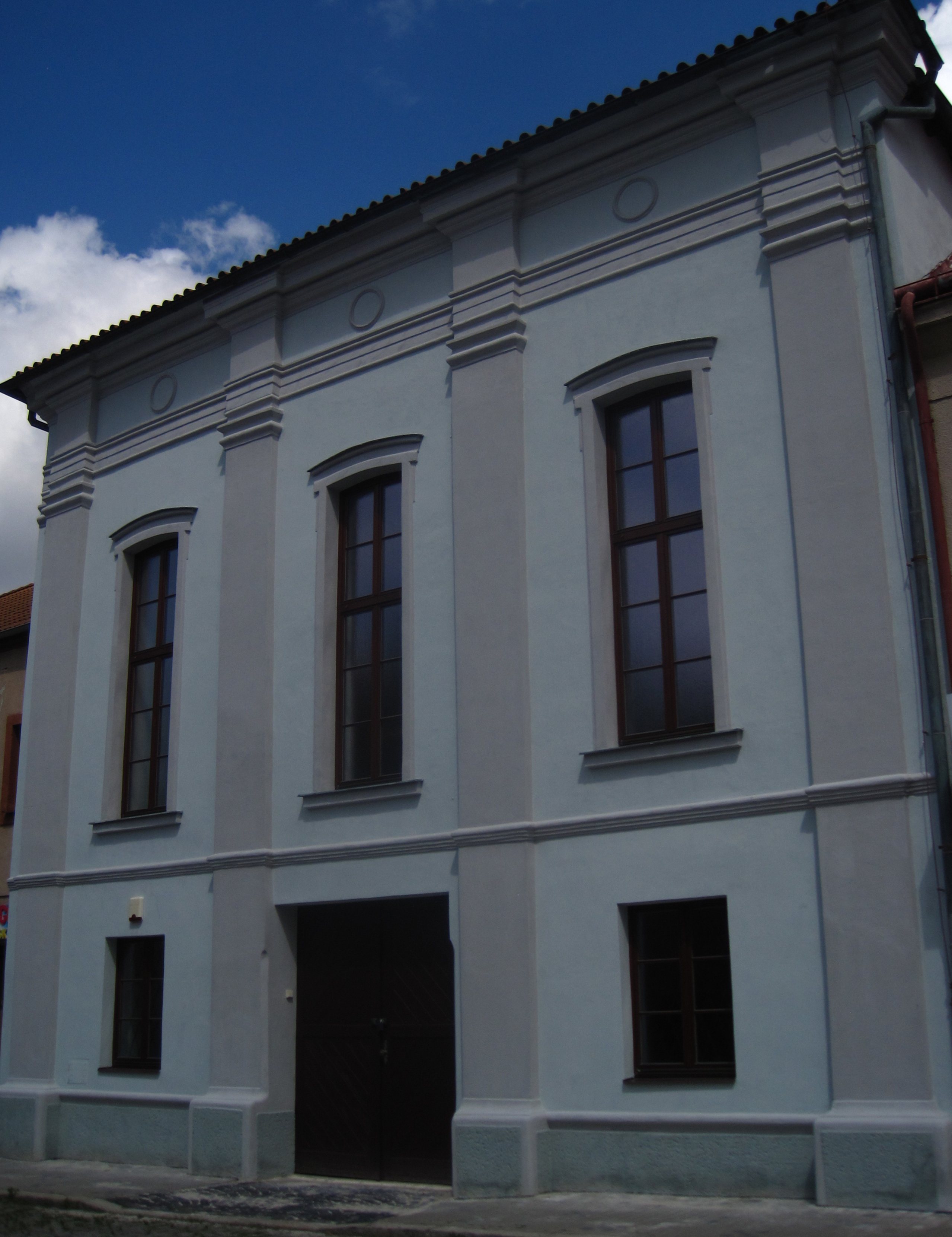 Bývalý kostel svaté Máří Magdaleny, náměstí Arnošta z Pardubic 274, Český Brod.